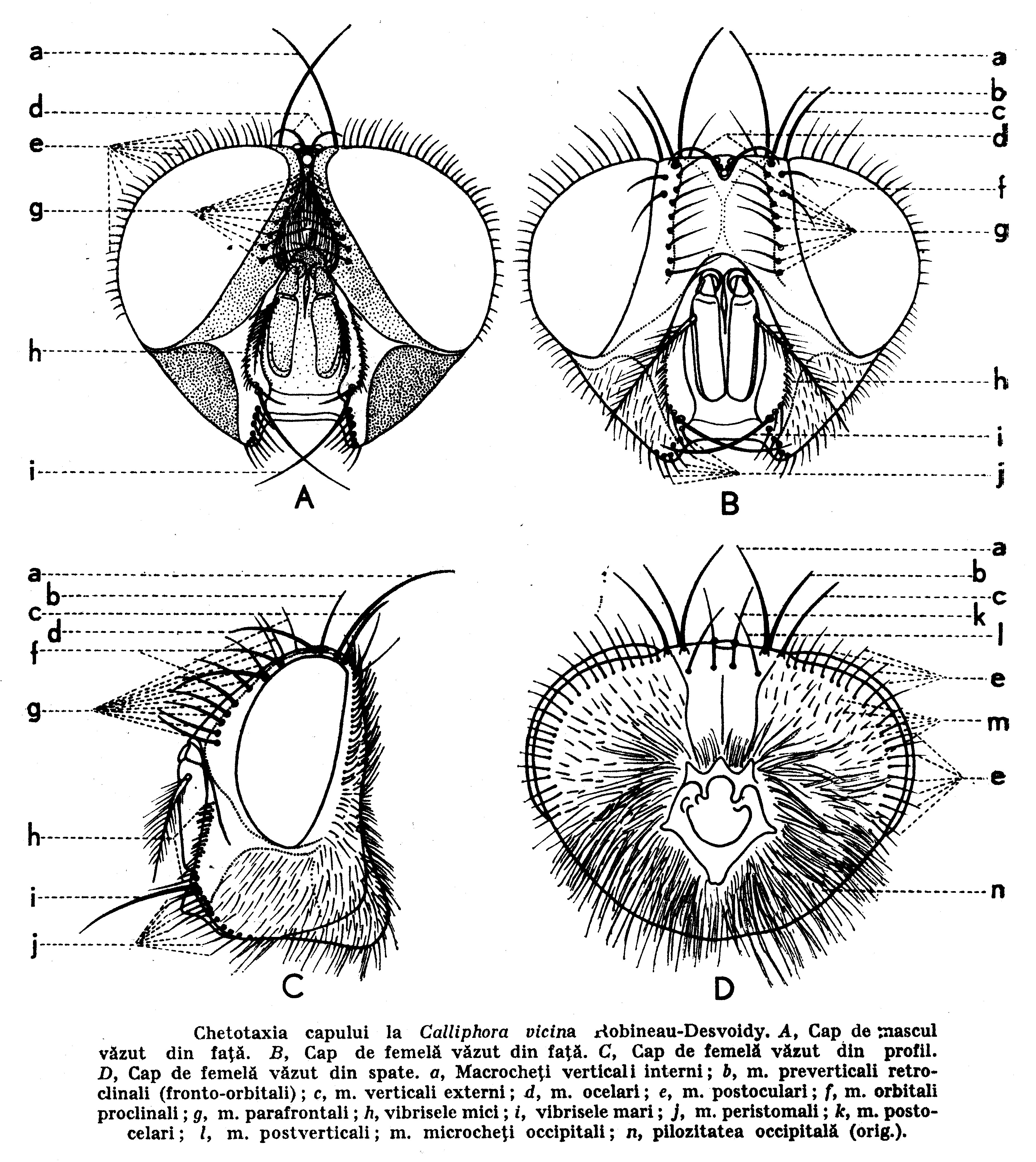 Chetotaxia capului la Calliphora. Proprietate personalâ Andy Z. Lehrer